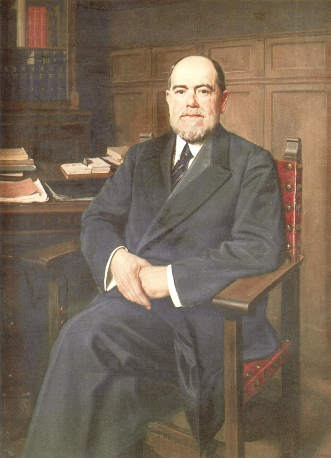 José Maestre Pérez